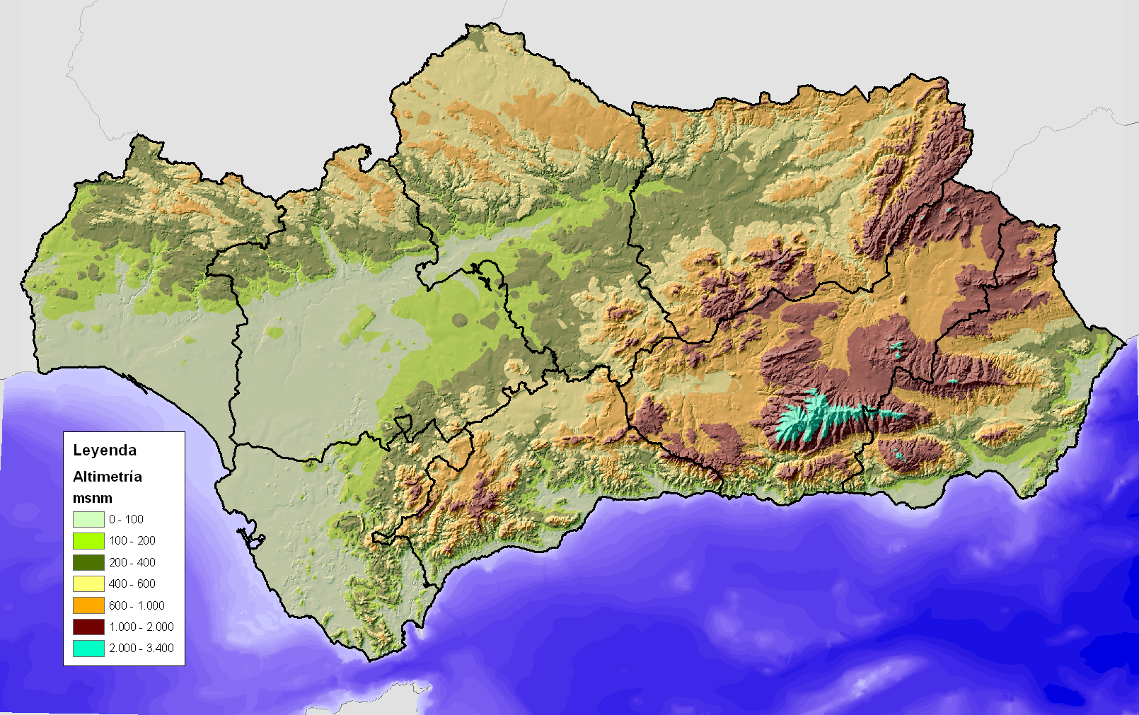 Niveles altiméticos del relieve de Andalucía